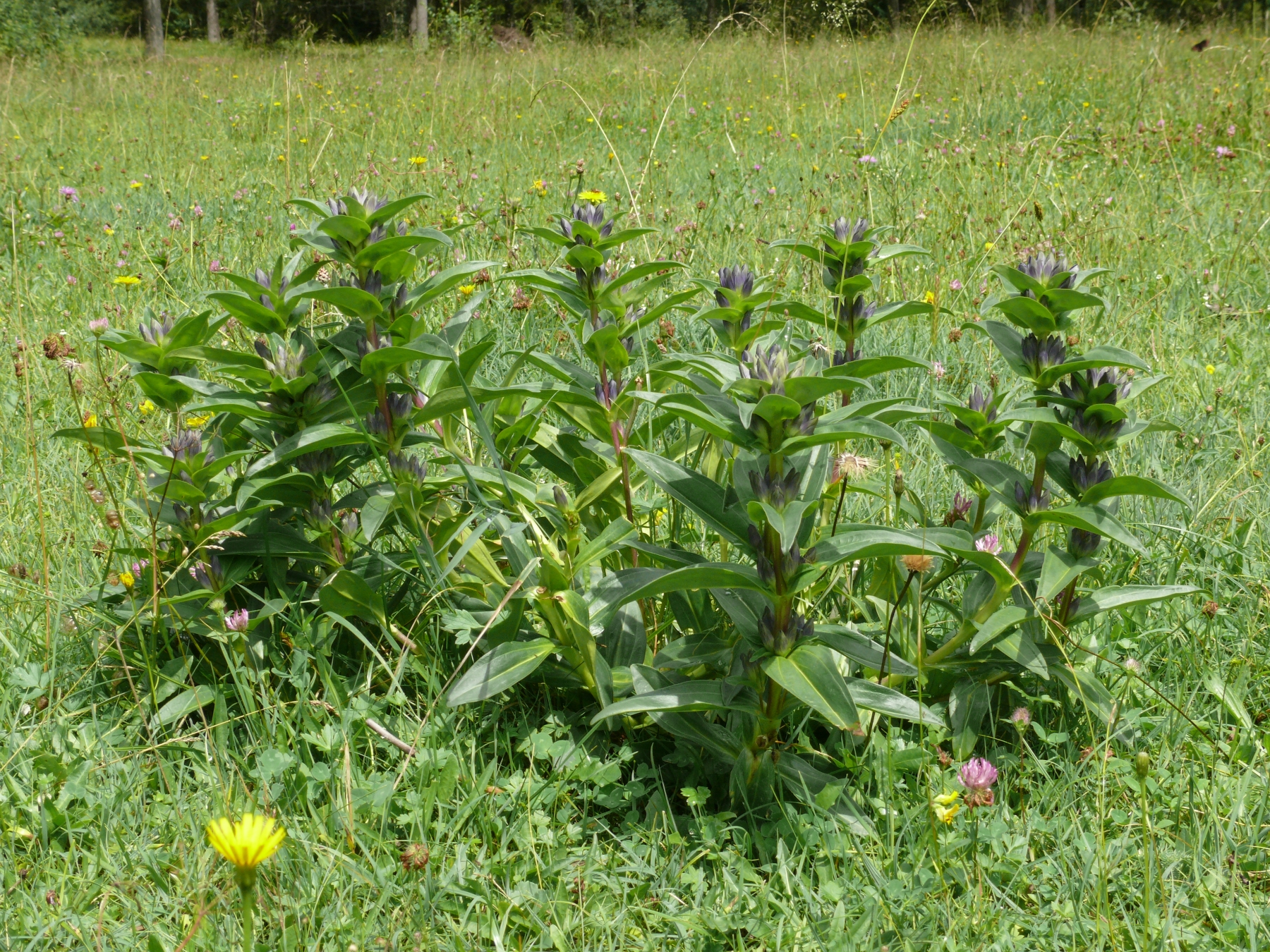 Gentiana cruciata, Allgäuer Alpen, Germany